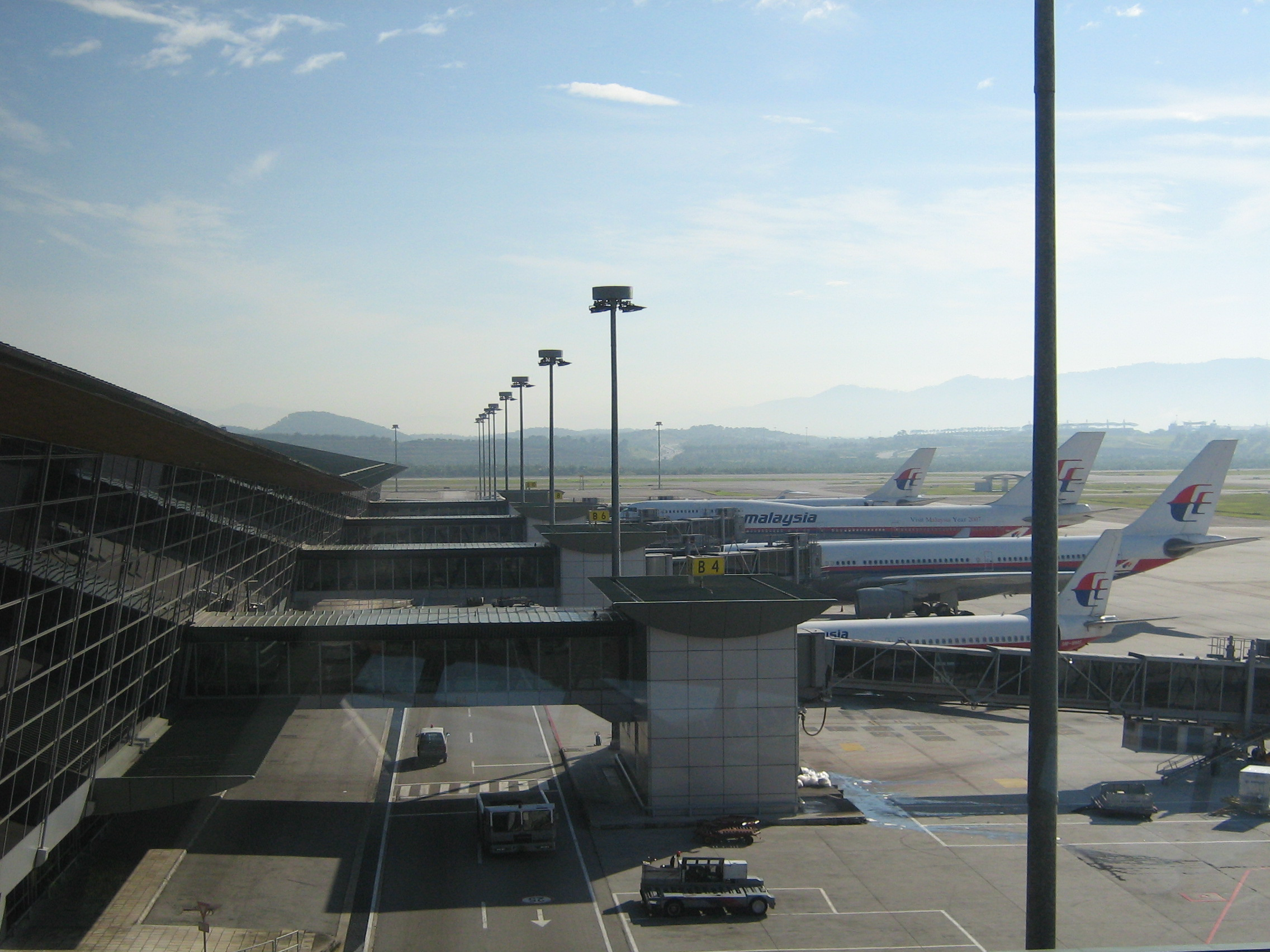 Malaysia Airlines' jets at KLIA